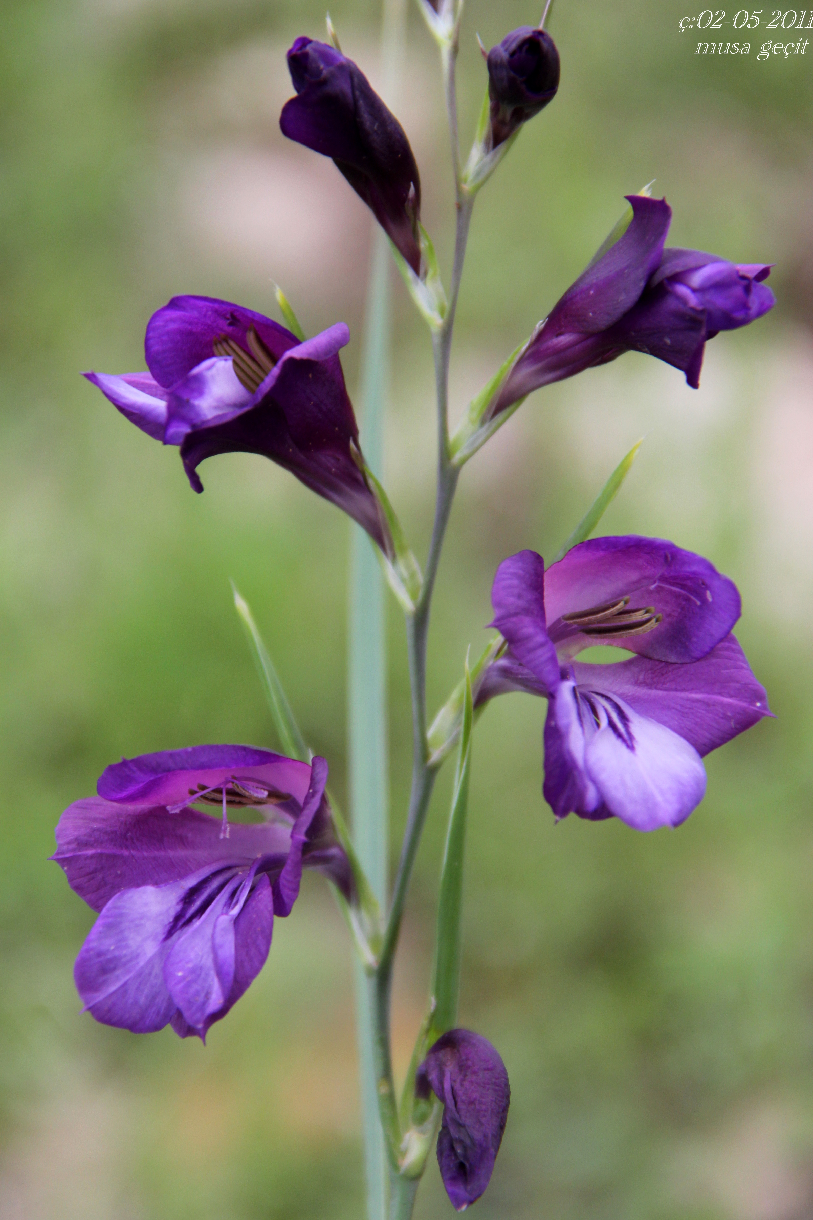 Yer:Mardin Gladiolus atroviolaceus